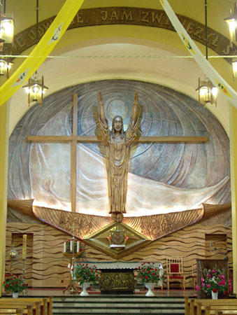 Kościół św. Stanisława Biskupa Męczennika w Gdańsku - wnętrze.